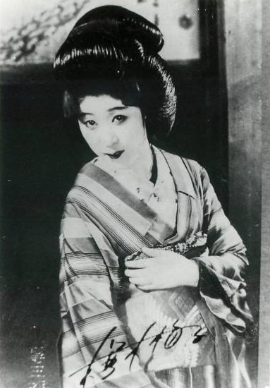 櫻木梅子、1925年の写真